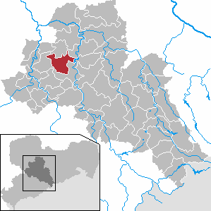 Erlau in Saxony - district Mittelsachsen